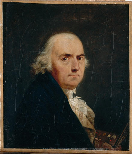 Jean-François Sablet, autoportrait